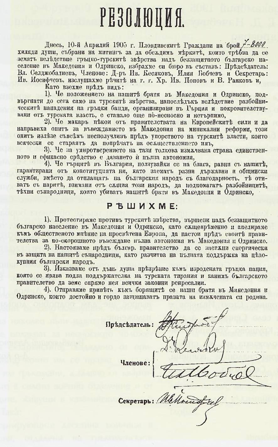 Резолюция на митинг на гражданите на Пловдив по повод клането в Загоричани.